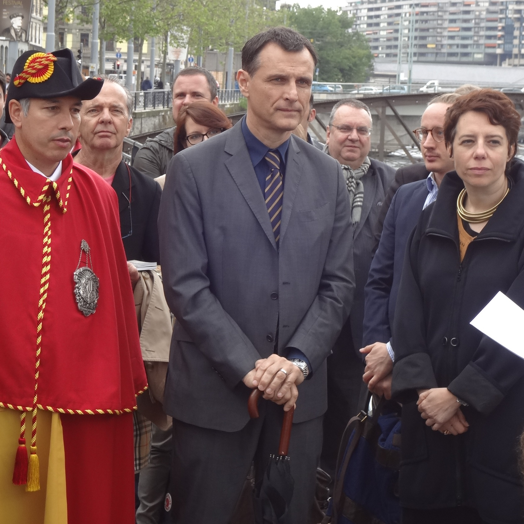 Autorités lors de l'inauguration de la plaque dédiée à Bartholomé Tecia à Genève le 10 juin 2013. Charles Beer et Sandrine Salerno.